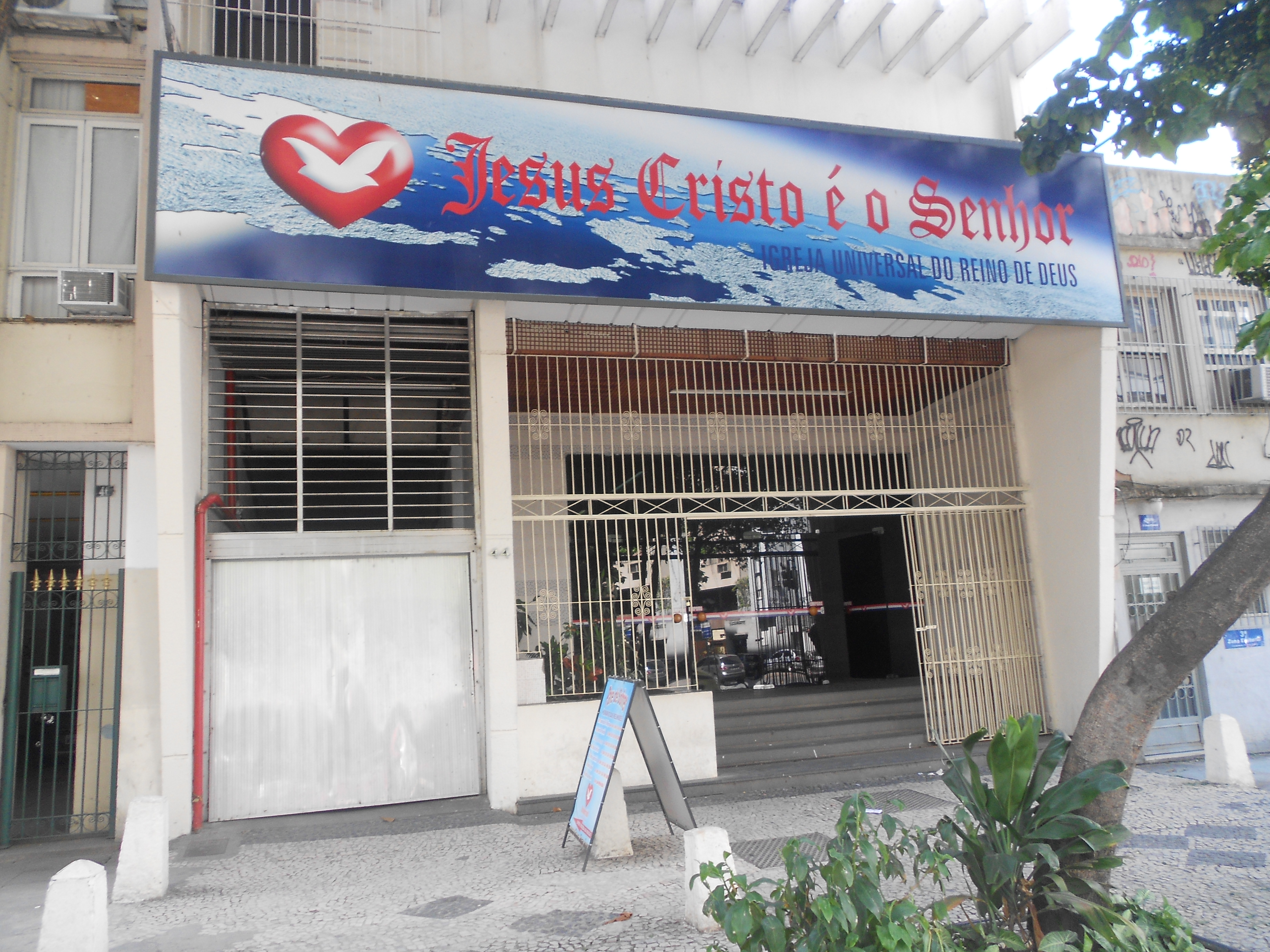 Igreja Universal do Reino de Deus, situado na Rua Conde de Baependi, Flamengo, Rio de Janeiro, Brasil.